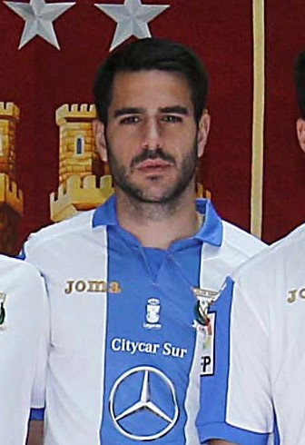 Felicidades pepineros!! Vuestro ascenso a Primera es la historia de un sueño, el resultado de vuestro trabajo y esfuerzo. Sois un orgullo para todo Madrid! Enhorabuena CD Leganés. #LeganésEsDePrimera